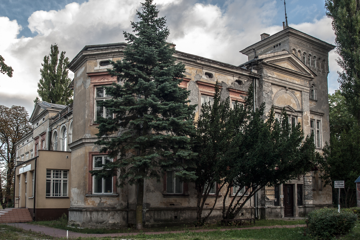 Pruszków, pałac, 1900